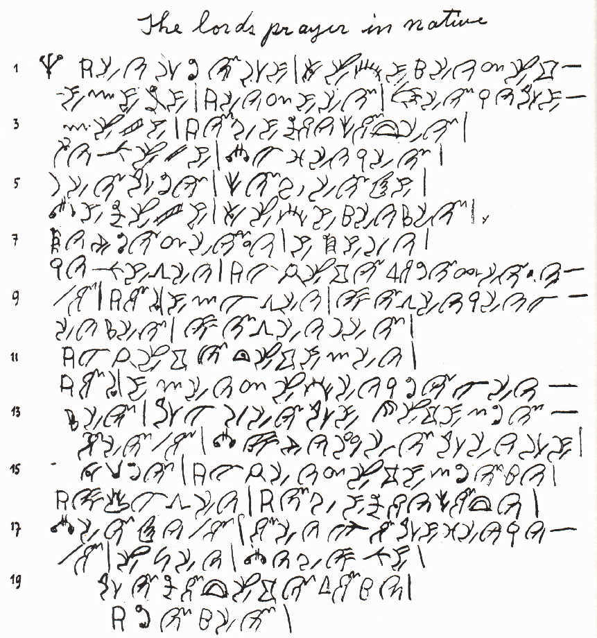 Молитва «Отче наш» на центрально-юпикском языке, записанная юпикским слоговым письмом.